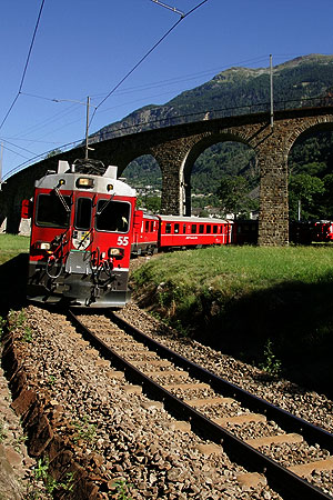 Kreisviadukt (Viadotto) in Brusio